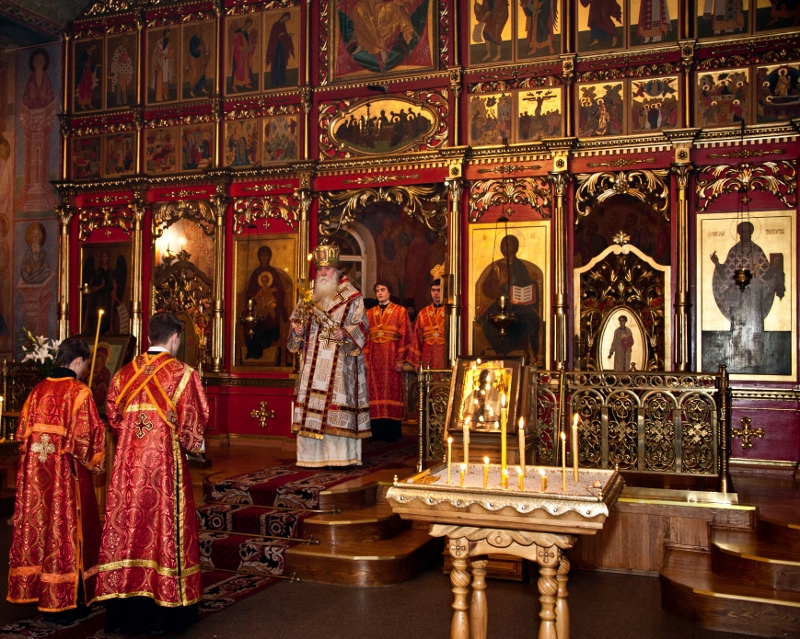 День тезоименитства правящего архиерея Мурманской и Мончегорской митрополии.